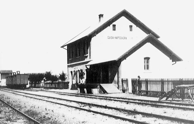 Гарата в Гида-Капчохори, Гърция).